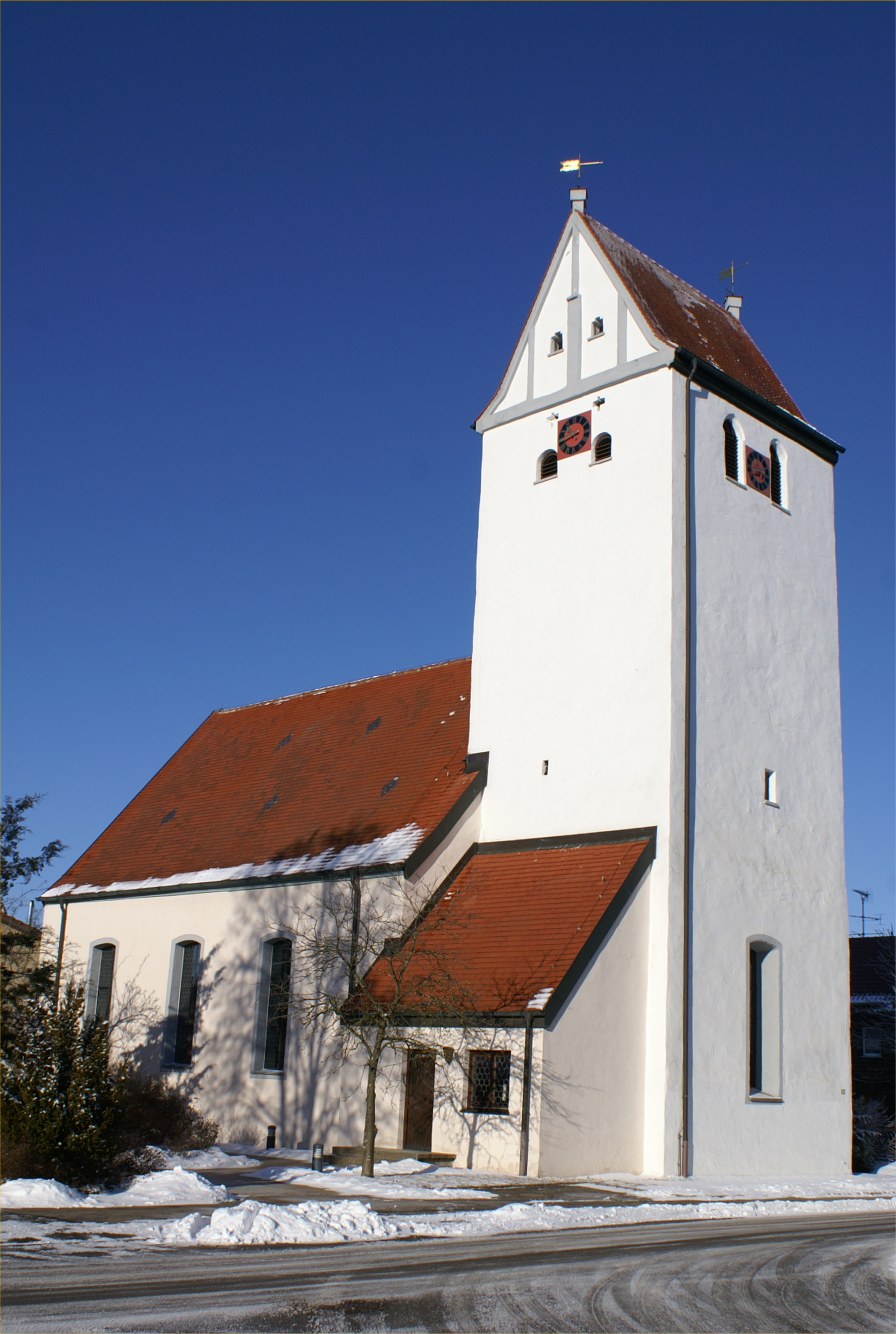 Evangelische Kirche in Mehrstetten im Landkreis Reutlingen